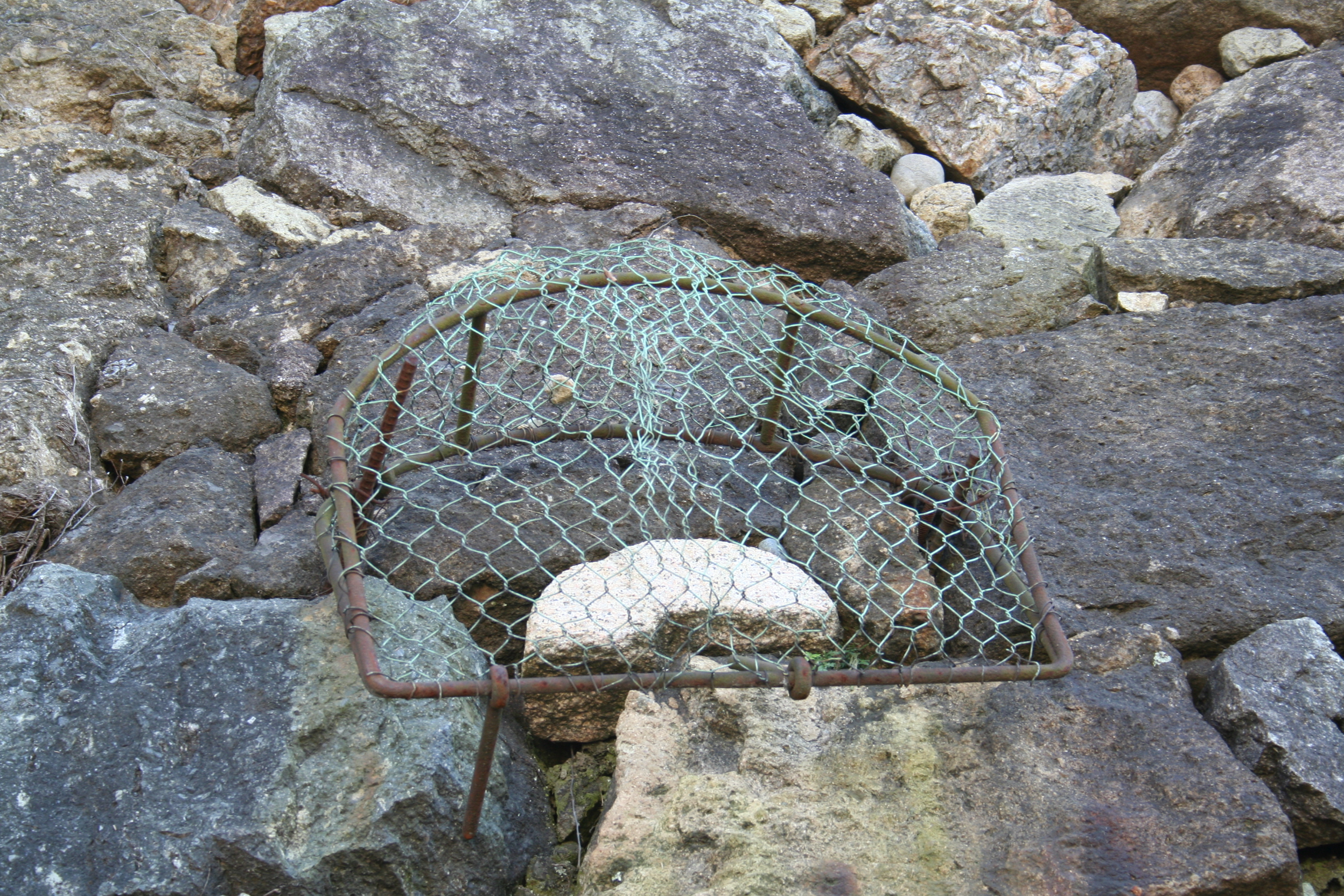 2009年秋の姫路城。 姥が石。羽柴秀吉が城主だった頃、城の築城に苦労しているとの話を聞いた老婆が自分が所有しているこの石臼を使ってくれと差し出したという逸話が残っている。